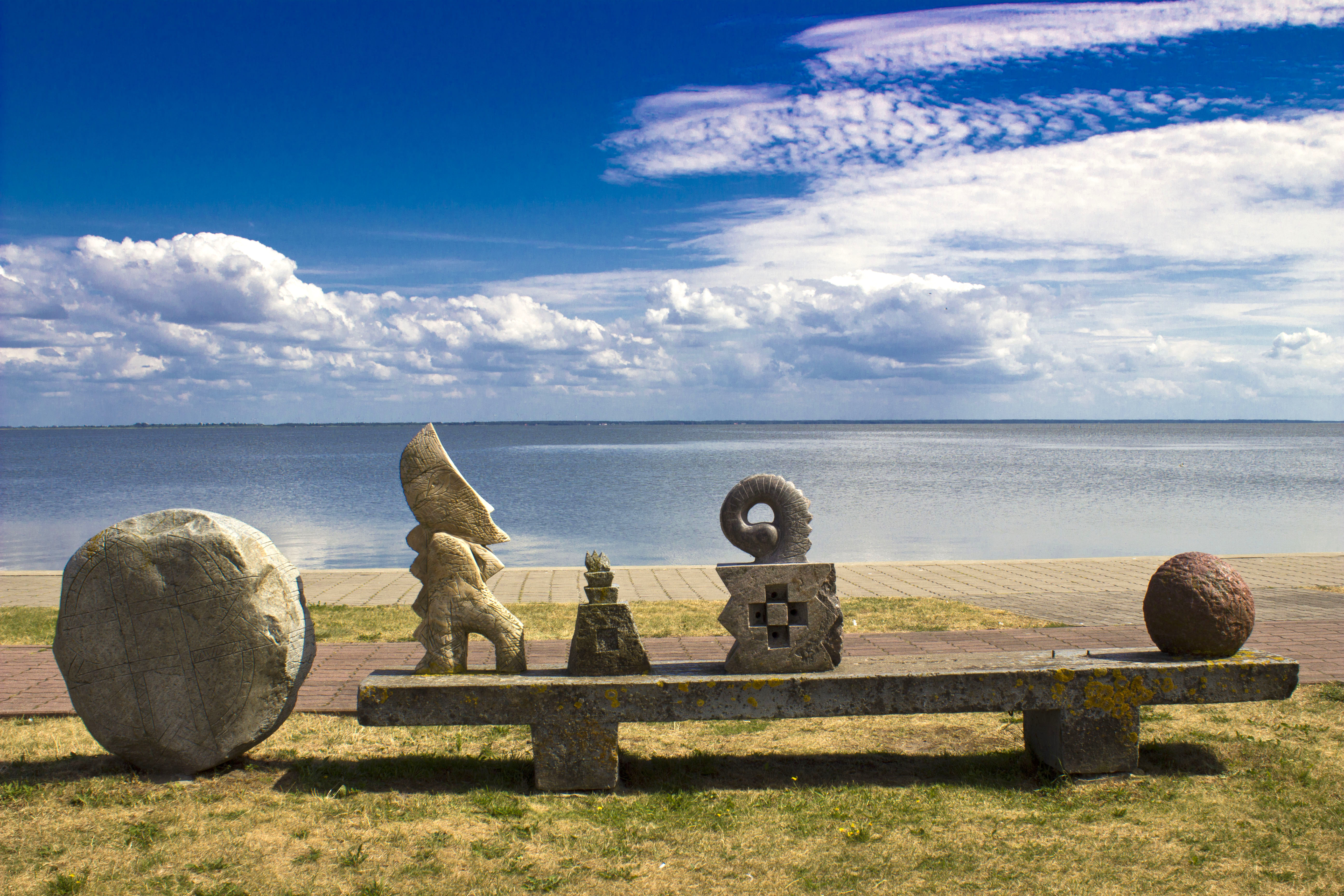 Juodkrantė Curonian Spit